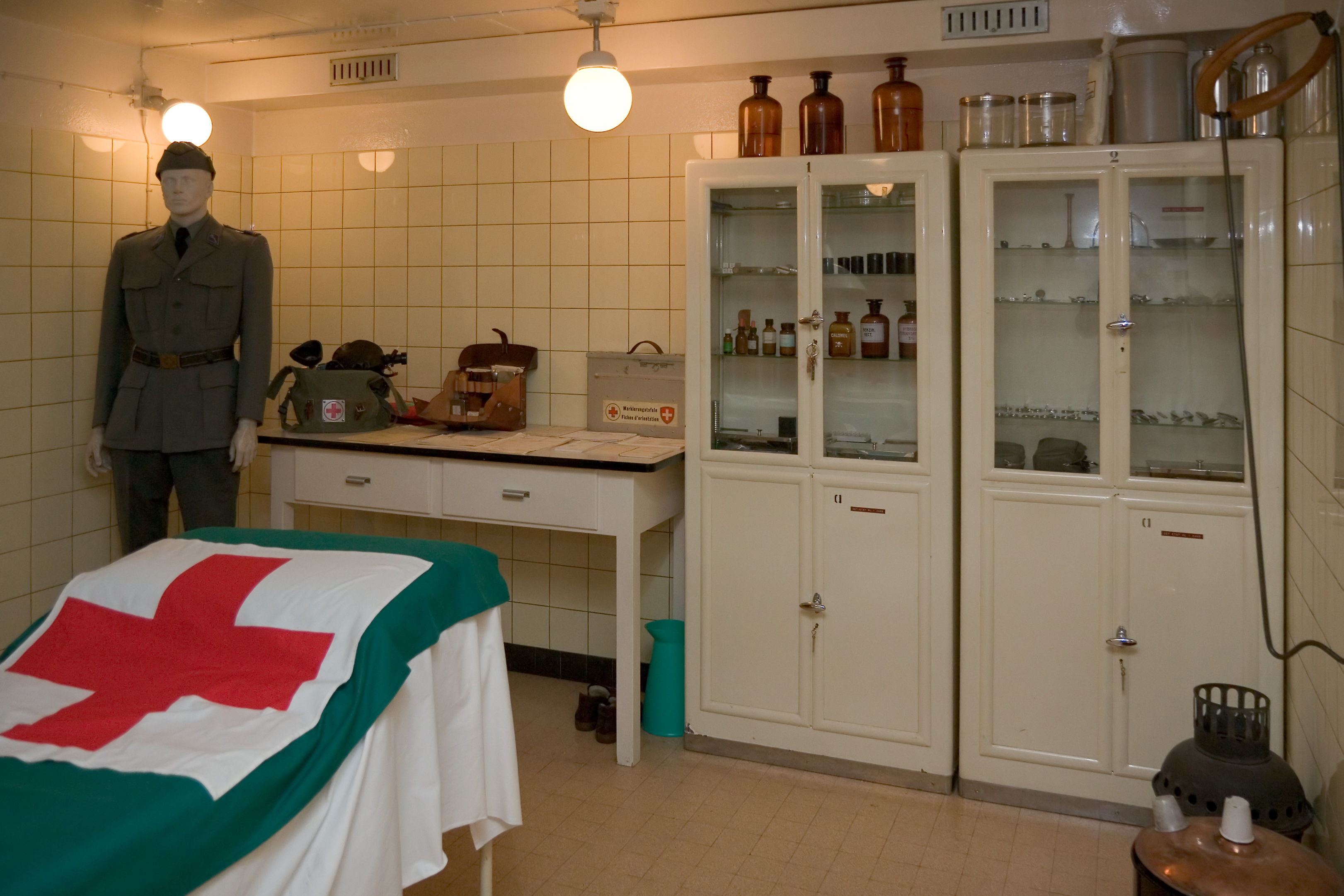 kleines Spitalzimmer im Festungsmuseum Vitznau